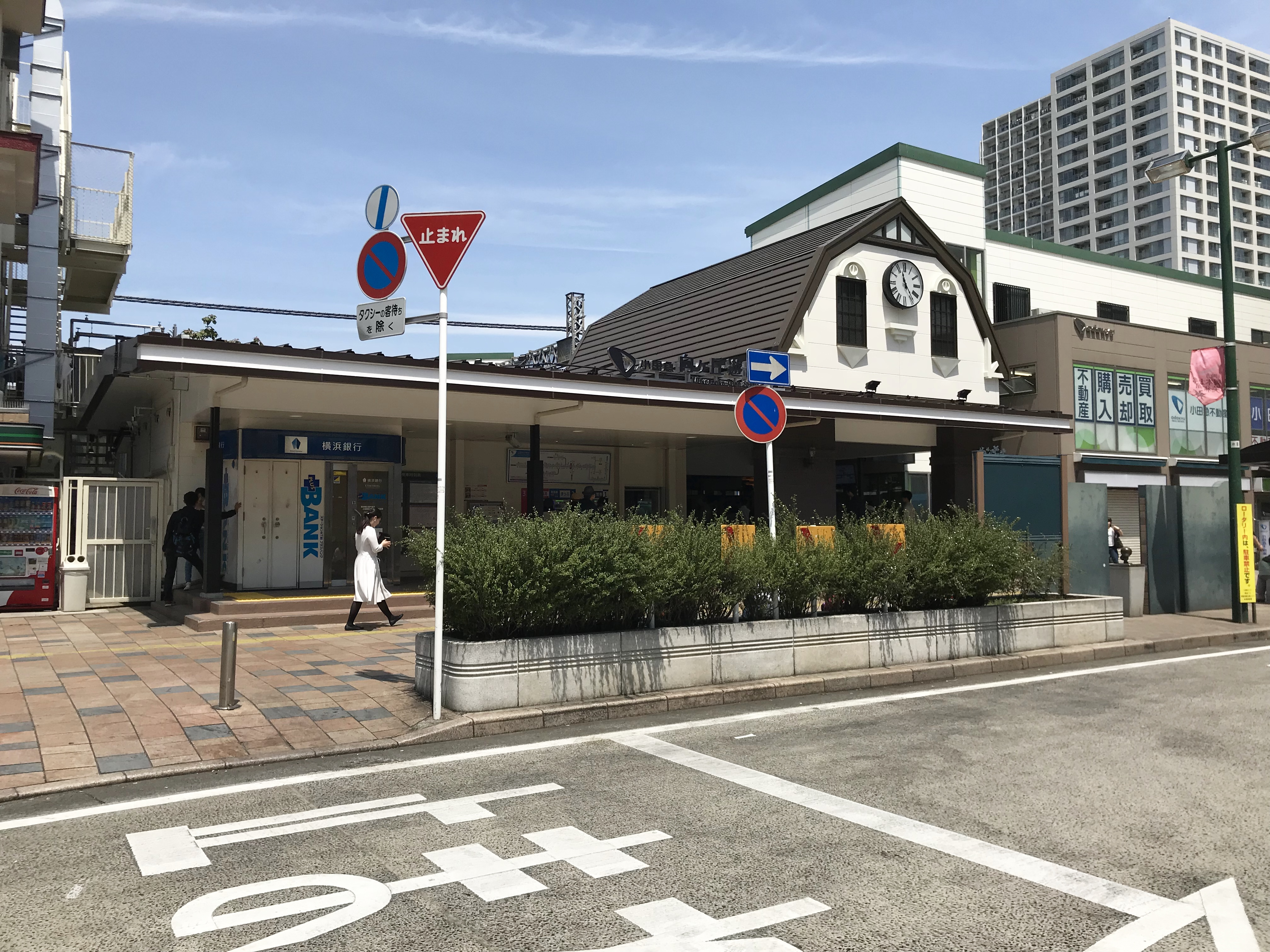 小田急小田原線向ヶ丘遊園駅南駅舎